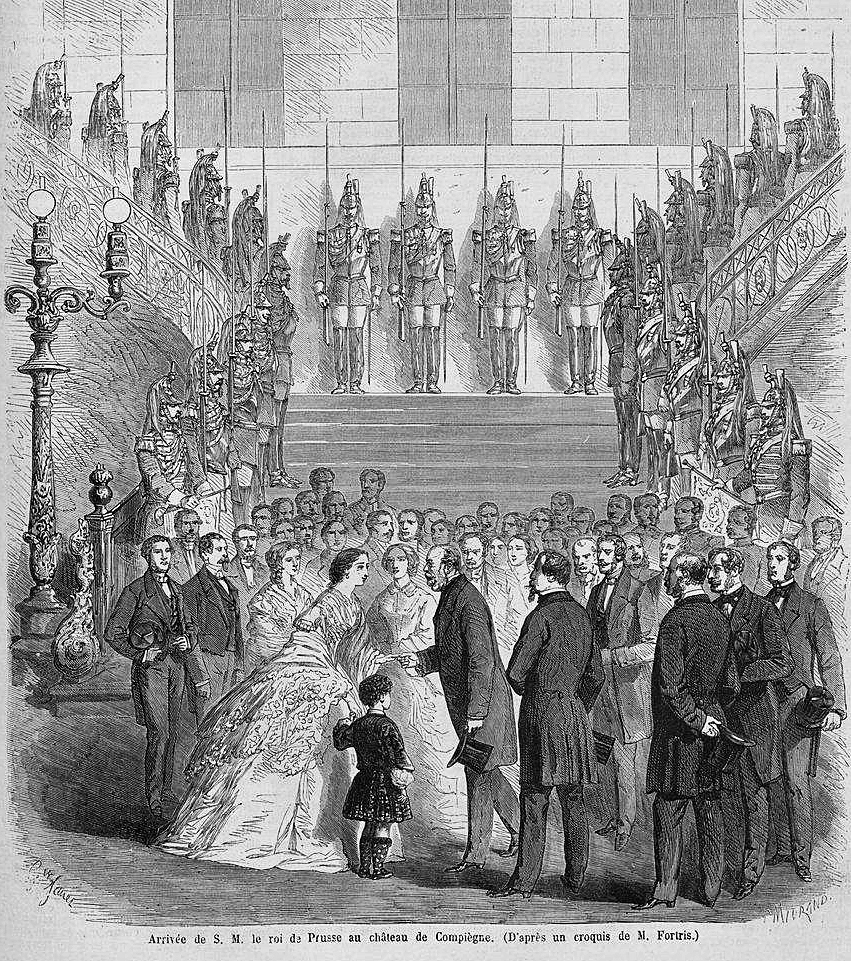 Haie d'honneur de l'escadron des cent-gardes dans l'escalier du château de Compiègne (France) à l'occasion de la réception du roi de Prusse par Napoléon III le 6/10/1861.